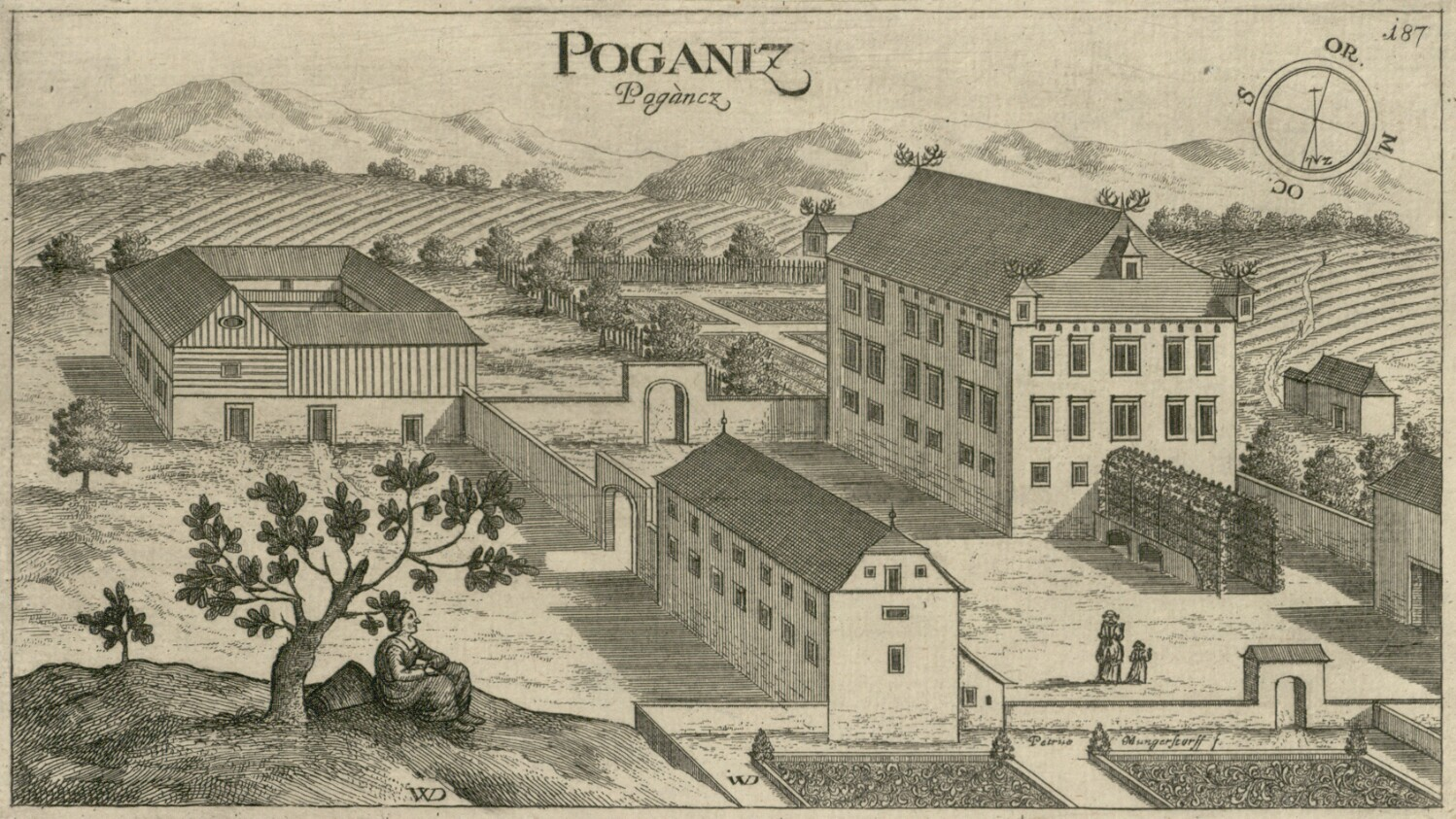 Dvorec Pogance